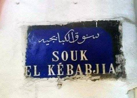 plaque métallique a l'entrée de Souk El Kebabjia